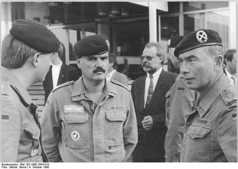 ADN-Bernd Settnik-4.10.90 Brandenburg: Einen Tag nach der deutschen Wiedervereinigung fand in Strausberg bei Berlin der erste Appell des Bundeswehrkommandos Ost statt. Befehlshaber hier ist jetzt Generalleutnant Jörg Schönbohm (r).